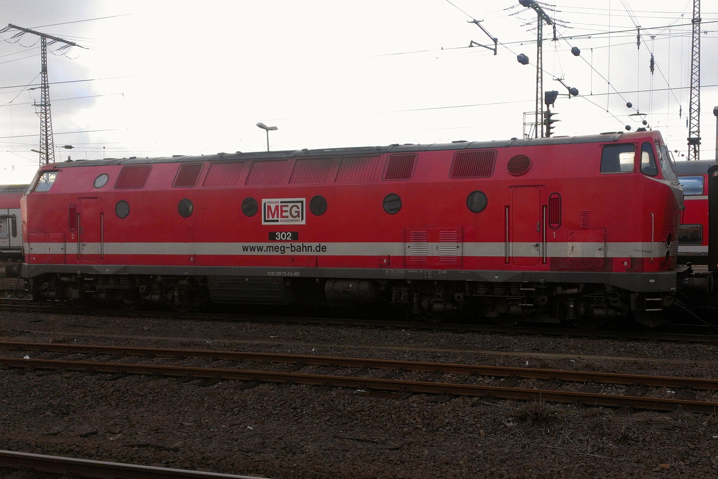 Diesellok der Baureihe 229 der Mitteldeutschen Eisenbahn GmbH im Hauptbahnhof Duisburg